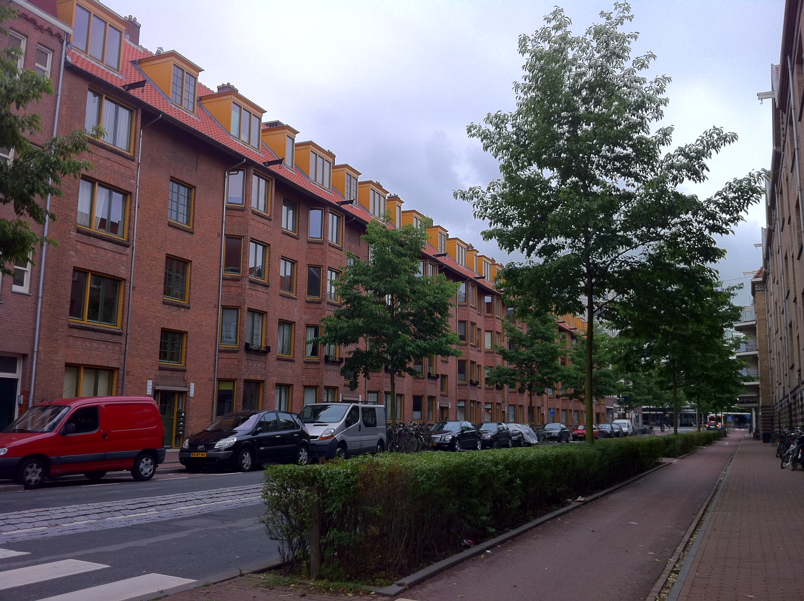 Amsterdam - Van Hallstraat, arbeiderswoningen ontworpen door Jop van Epen en Hein Berlage, bouwjaar 1917-1918 voor de Algemene Woningbouw Vereniging (AWV)